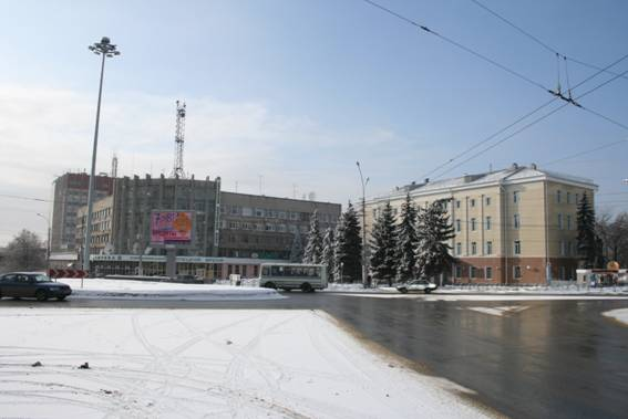 Липецк, площадь Плеханова